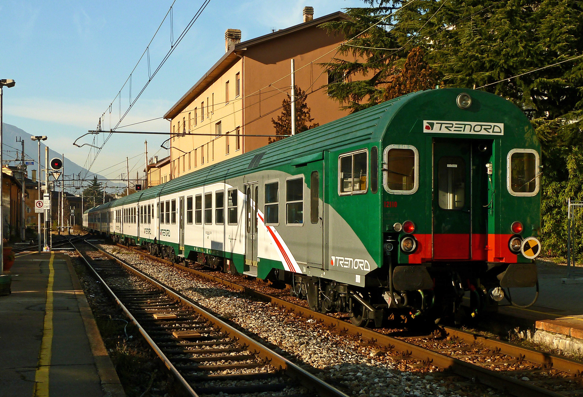 Carrozza semipilota tipo MDVC in livrea Trenord in sosta a Sondrio